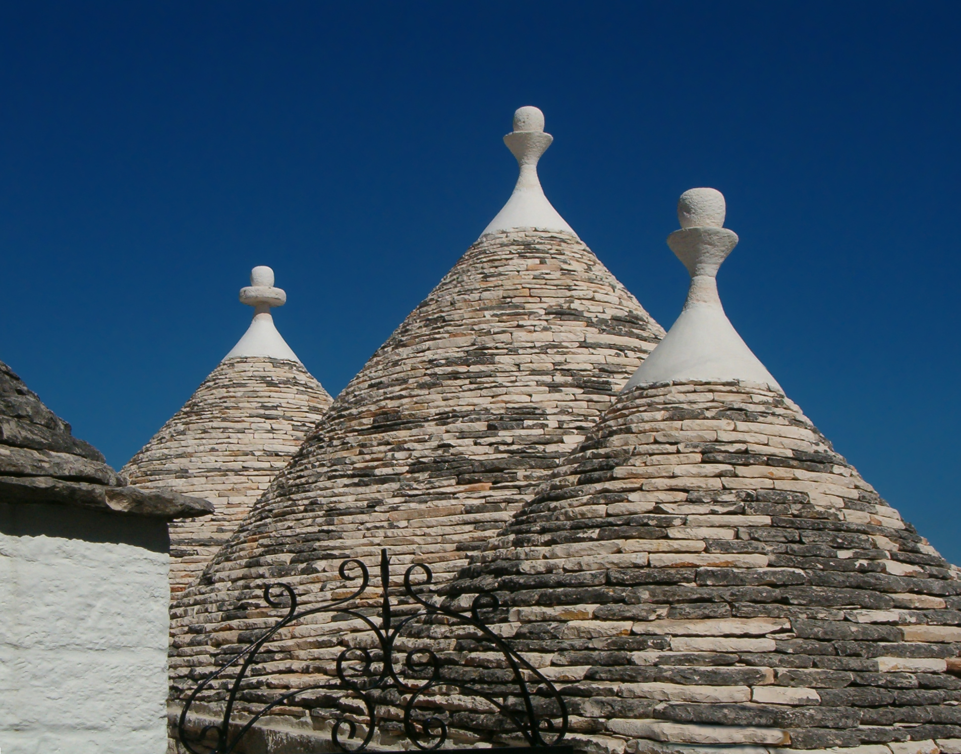 Trulli di Alberobello, Italy